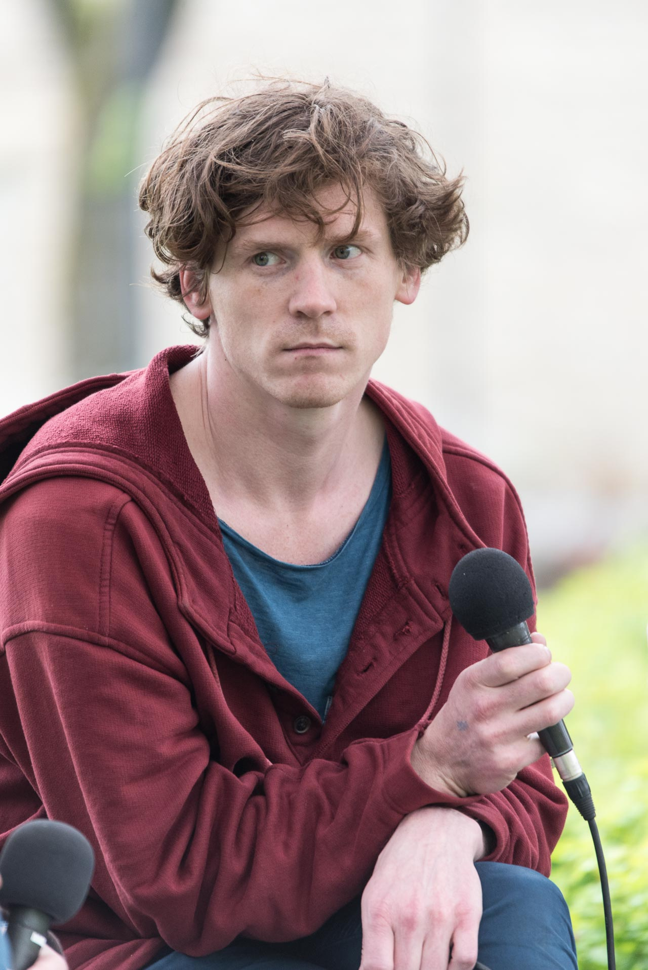 Märt Põder teisel Arvamusfestivalil Narvas.